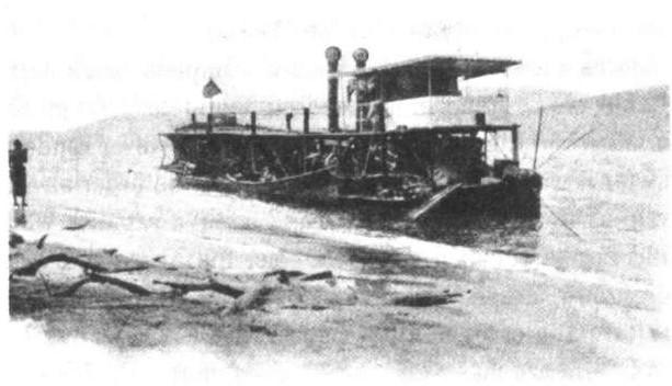 Image ancienne. Le Florida, un des bateaux utilisés par Stanley au Congo